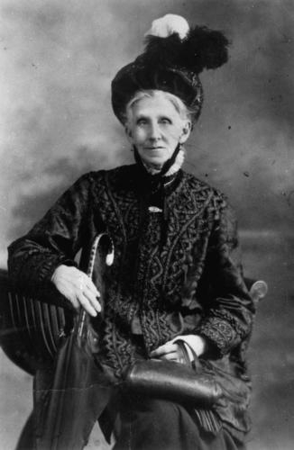 Emma Miller (26. Juni 1839; † 22. Januar 1917); Suffragette, Pazifistin, Gewerkschafterin und Mitgründerin der Australian Labor Party